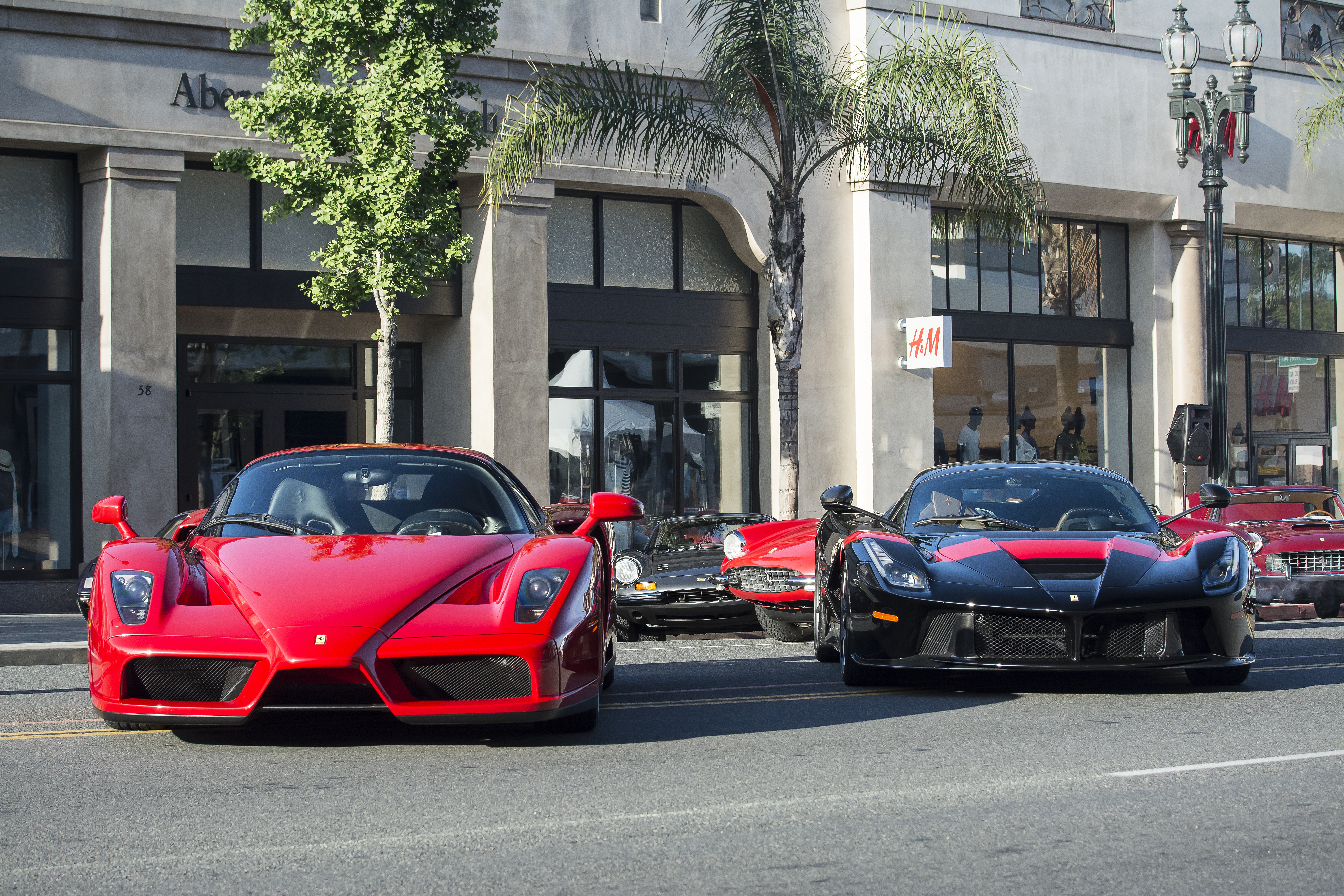 Ferrari Enzo and LaFerrari at Pasadena Concorso.